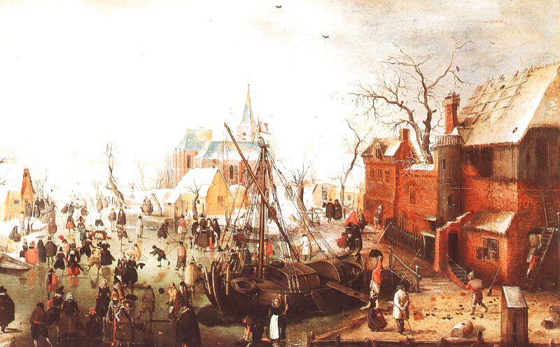 Winter Scene at Yselmuiden